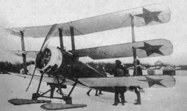 Triplane